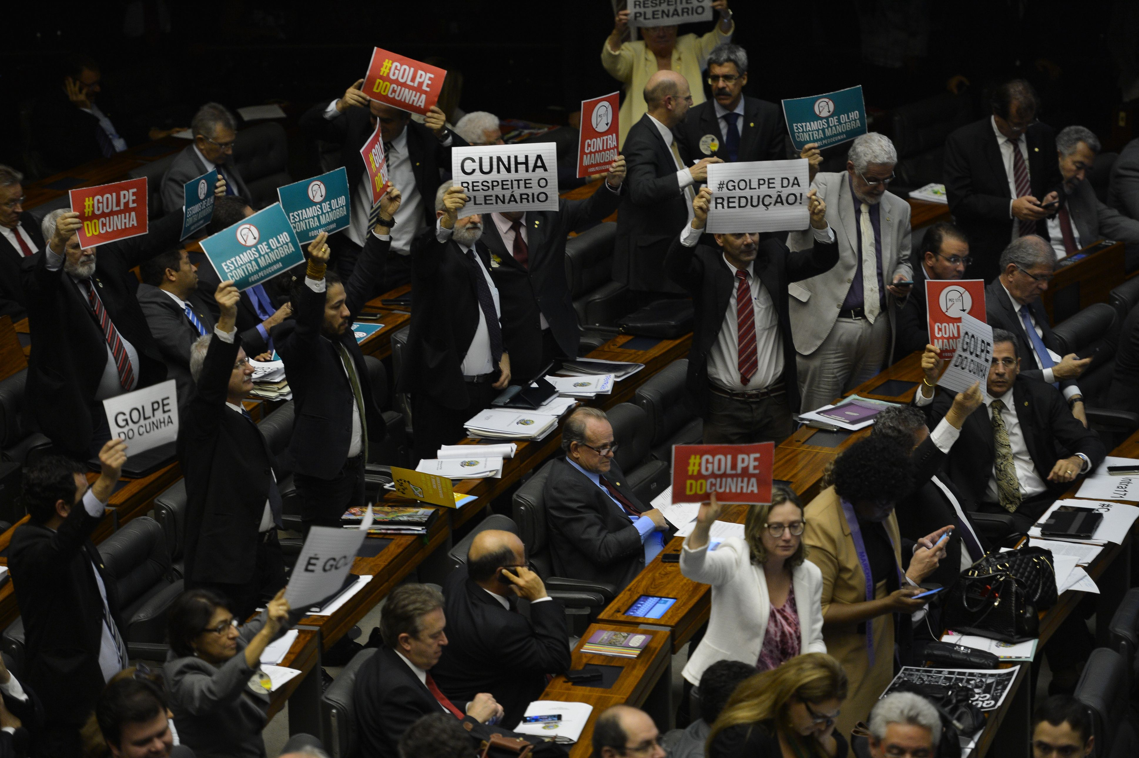 Sessão extraordinária destinada a continuar as votações da PEC da maioridade penal - PEC 171/93